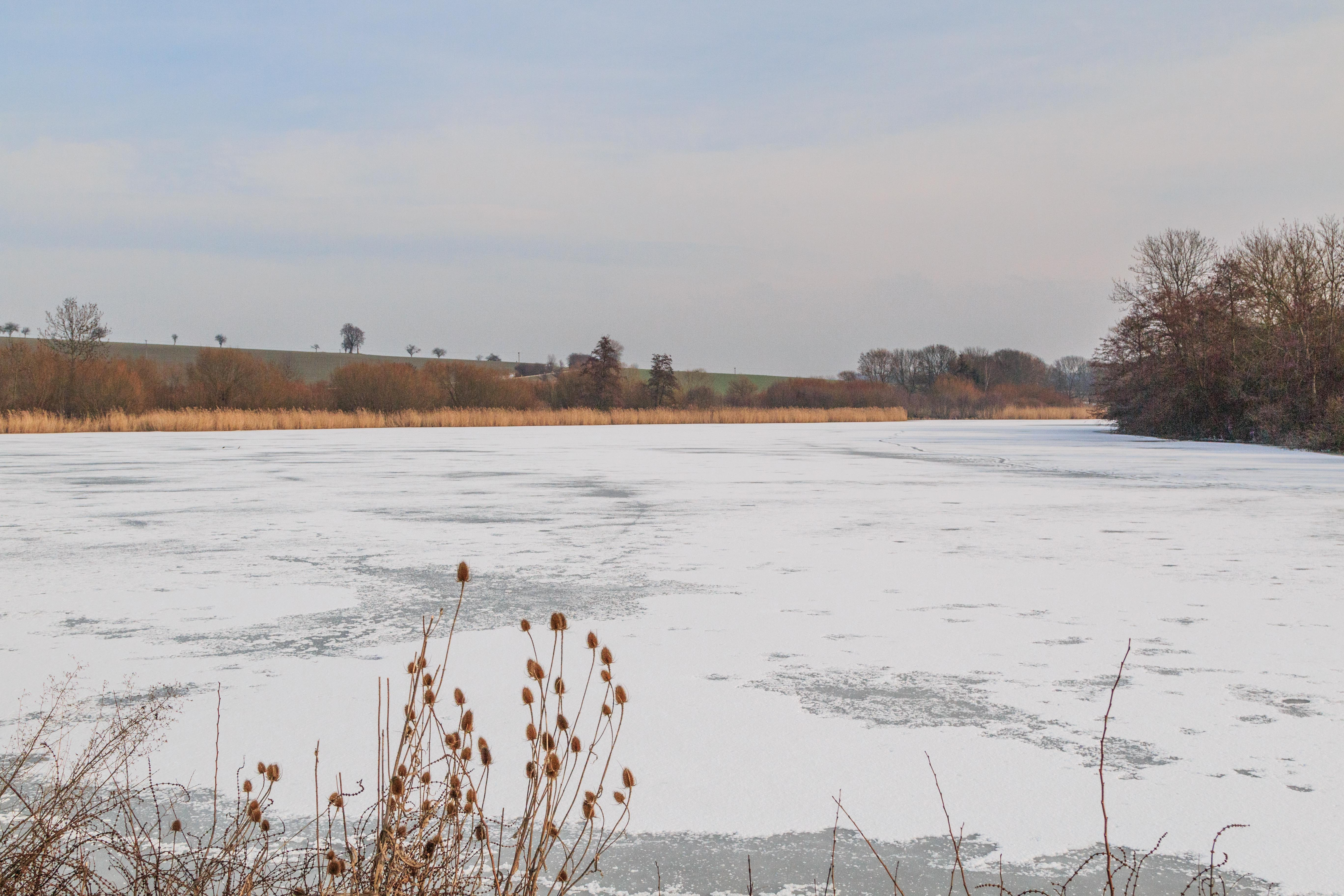 Bartoušovský rybník na říčce Mrlina